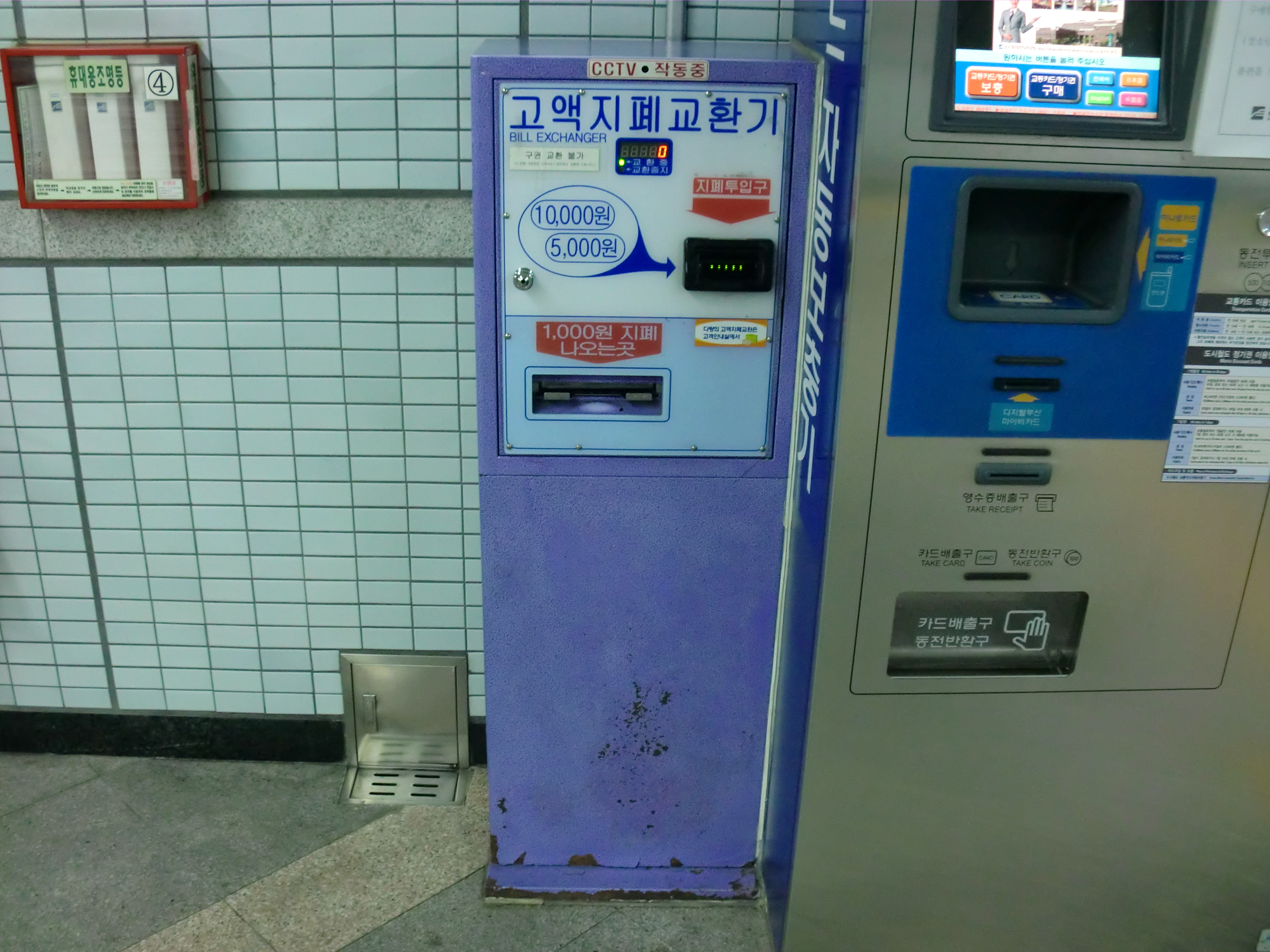 고액지폐교환기